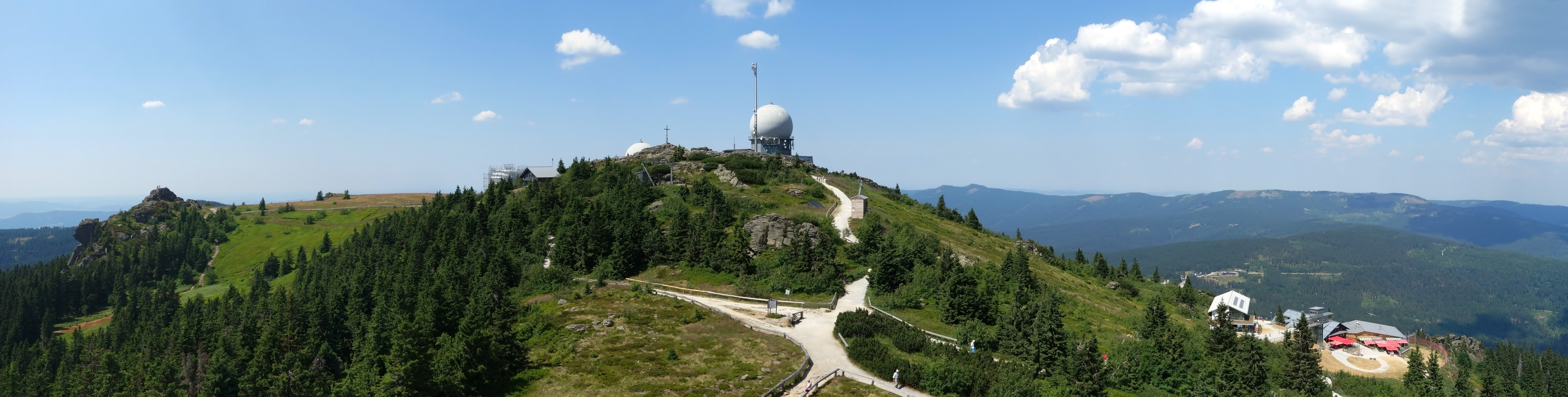 Der Große Arber, mit 1456 m über Normalnull höchster Berg des Bayerischen Waldes und von Niederbayern, von Süden, vom Großen Seeriegel aus betrachtet. In der Mitte ein Radom aus den 1980er Jahren, links davon das 1913 errichtete Gipfelkreuz. Diese Datei wurde mit Hugin erstellt.